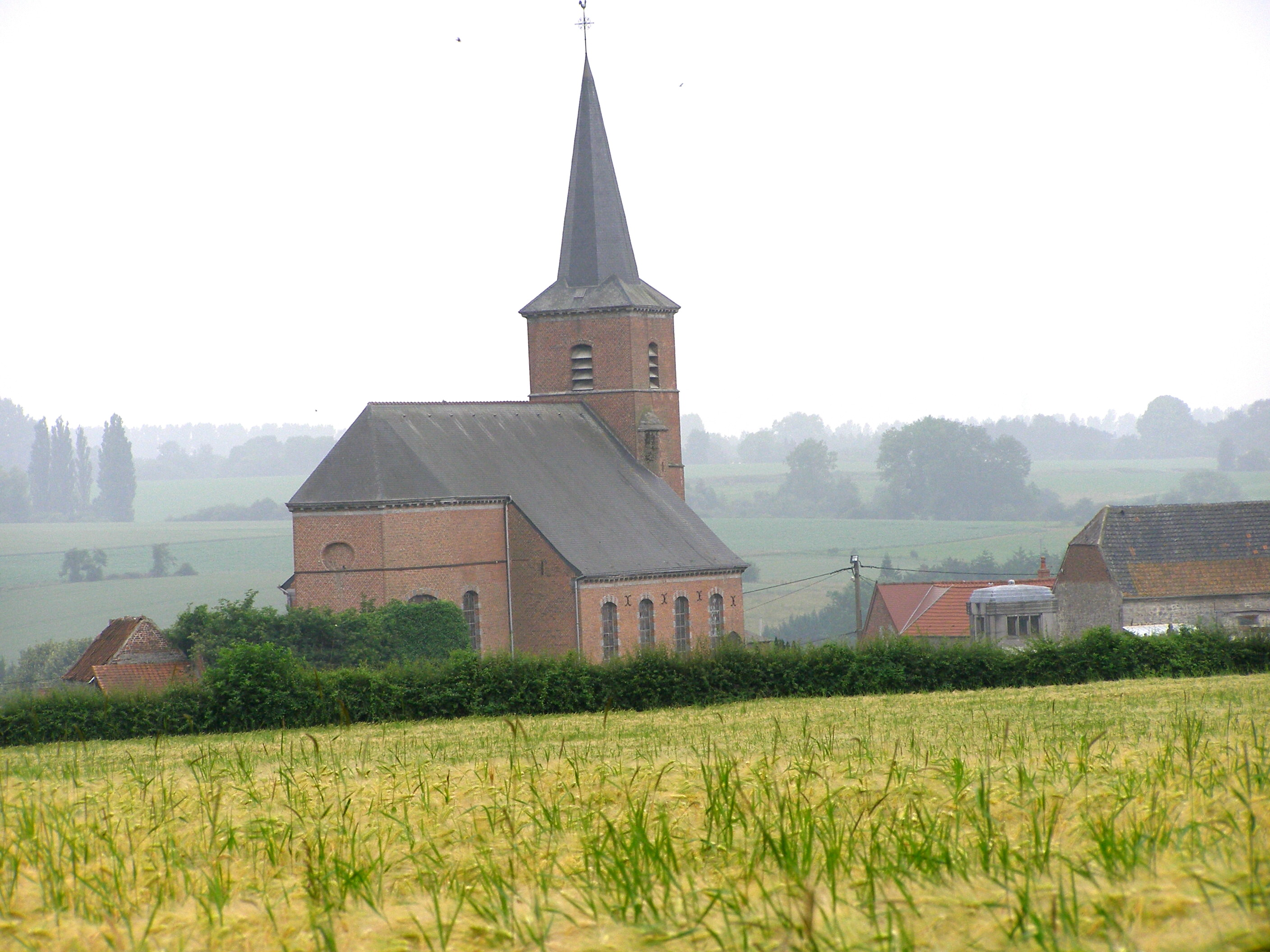 L'église.